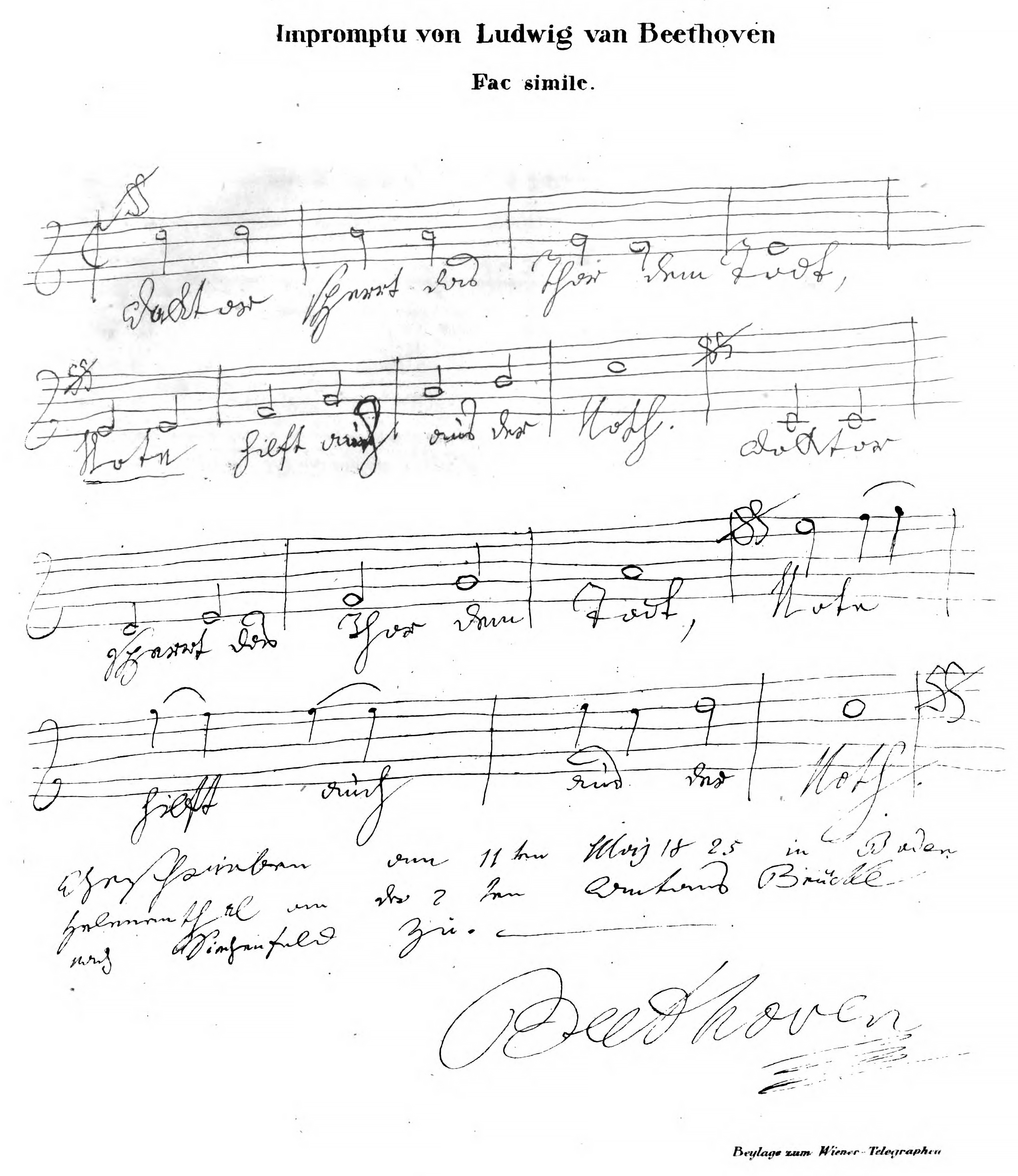 Impromptu aus der Feder Ludwig van Beethovens, gewidmet dem Arzt Anton Georg Brauhofer (1780–1845, auch: 1773–1846), verfasst an der Antonsbrücke im Helenental bei Baden bei Wien